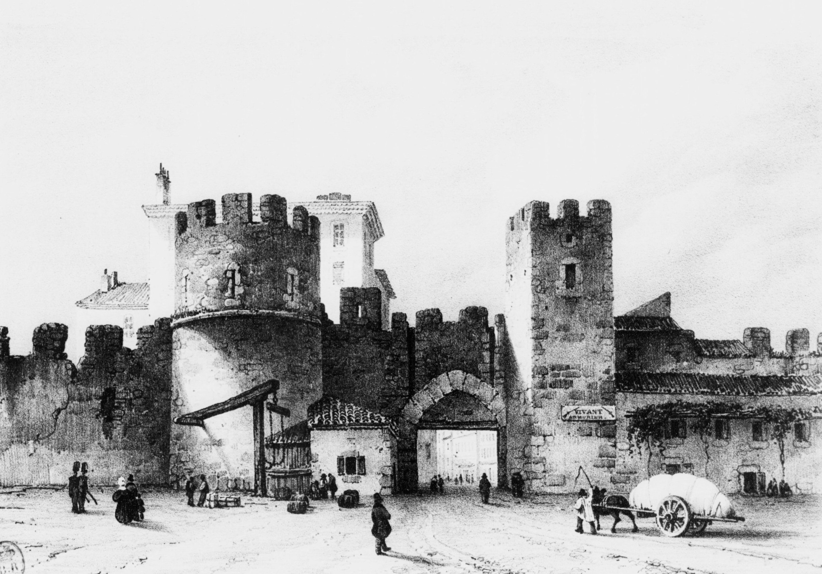 Album du Dauphiné, ou Recueil de dessins représentant les sites les plus pittoresques du Dauphiné.